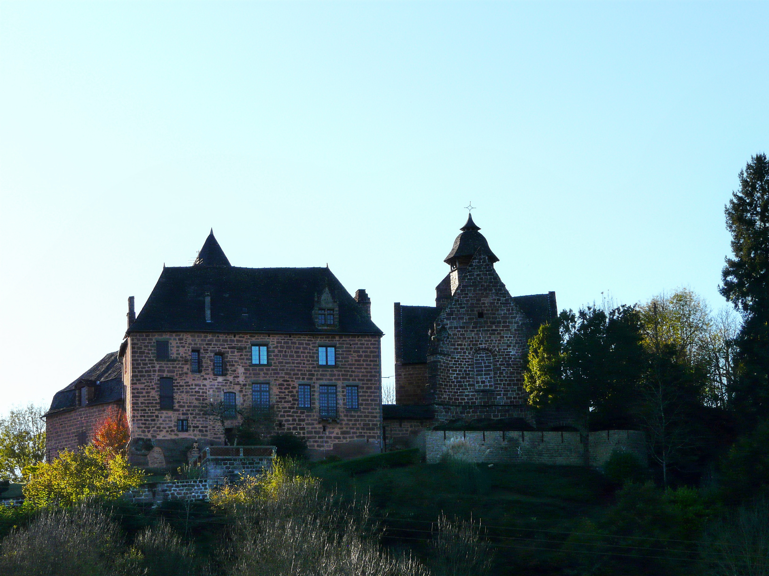 Le manoir et l'église de Saint-Cyr-la-Roche, Corrèze, France